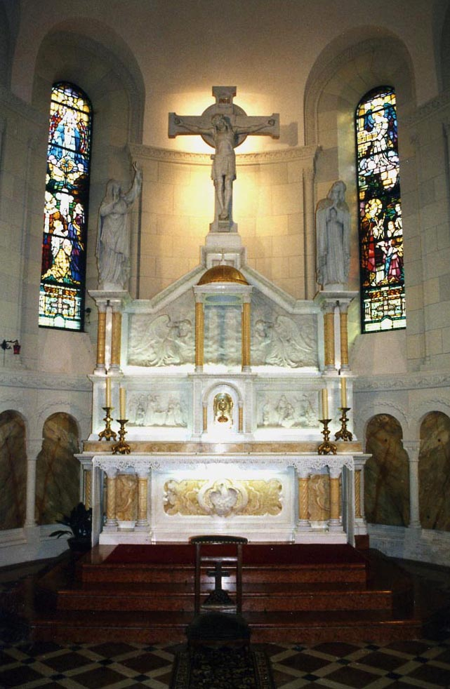 Le Maître-Autel en marbre de Carrare. Oeuvre du sculpteur italien Gino Cavallini (Pove). Photo : Samuel Wernain (2005)